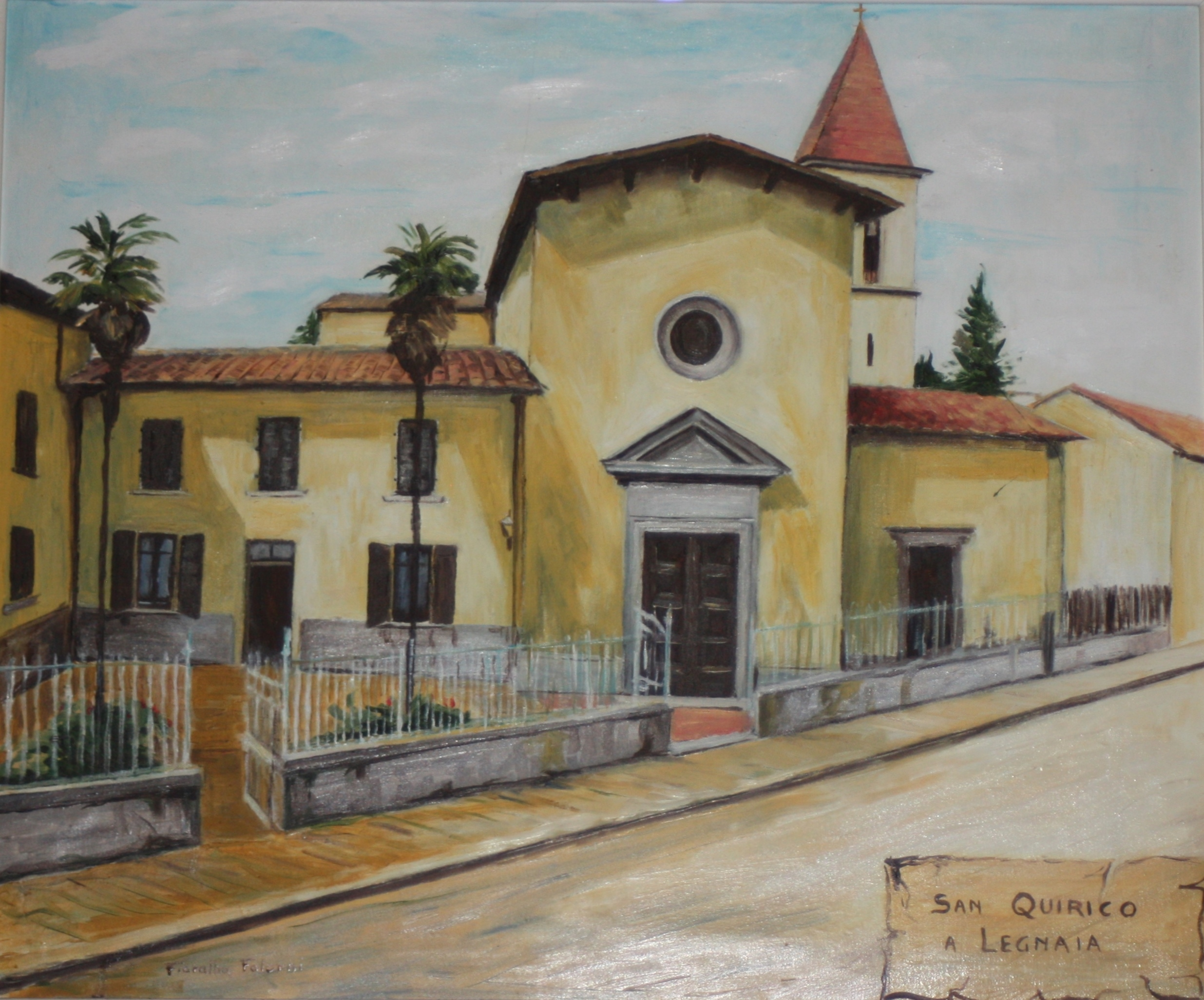 Dipinto della Chiesa di San Quirico a Legnaia, raffigurante la facciata della chiesa